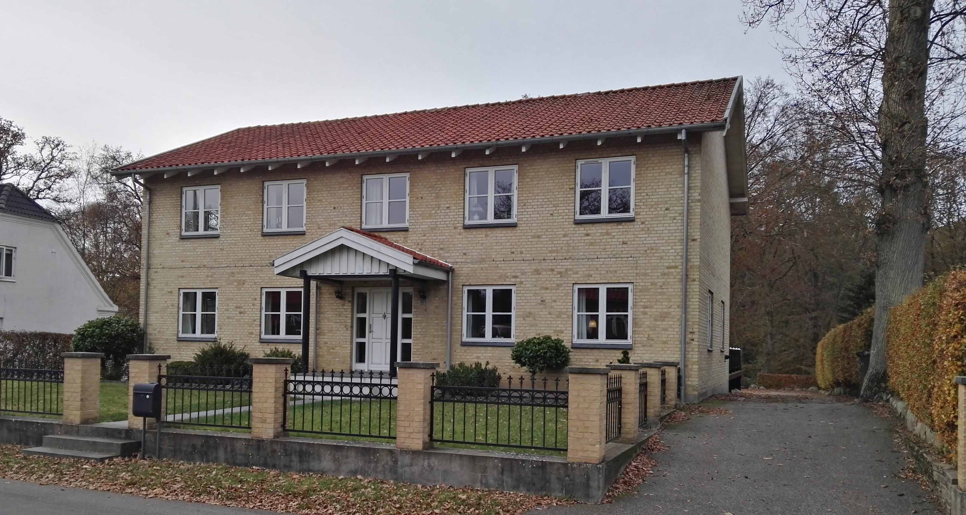 Den tidligere Ravnsbjerg Kommunes rådhus på Egeskovvej 16 i Hald Ege